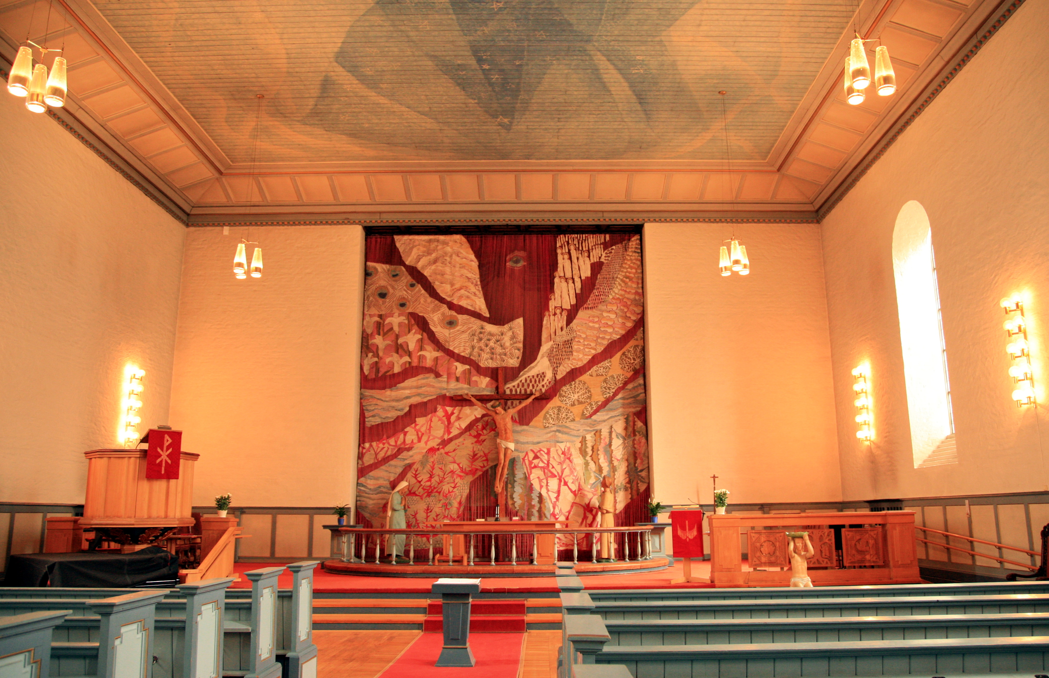 Majorstuen kirke, a church at Kirkeveien, Oslo